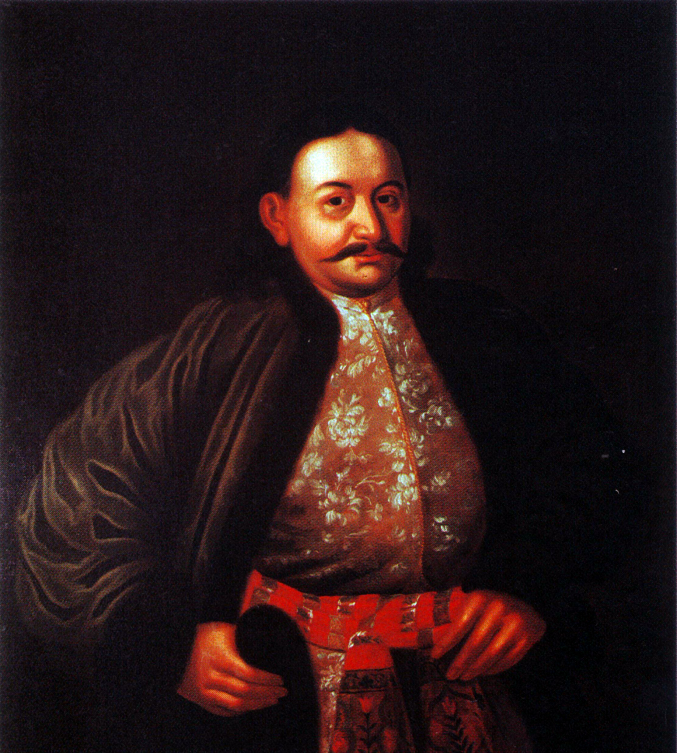 Князь Федор Юрьевич Ромодановский, Fedor Romodanovsky